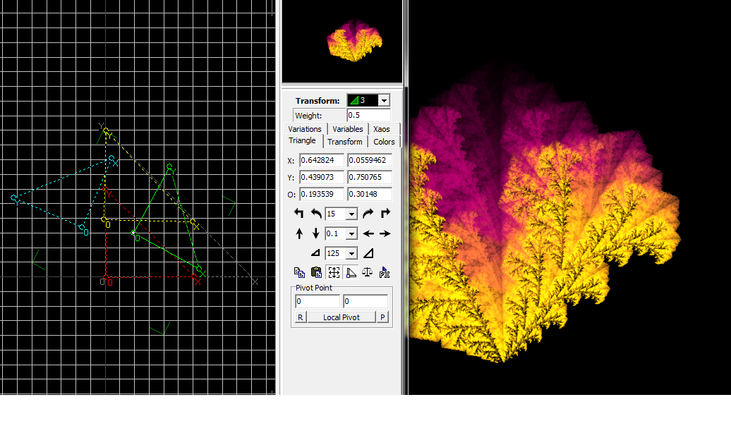 document créé sous apophysis